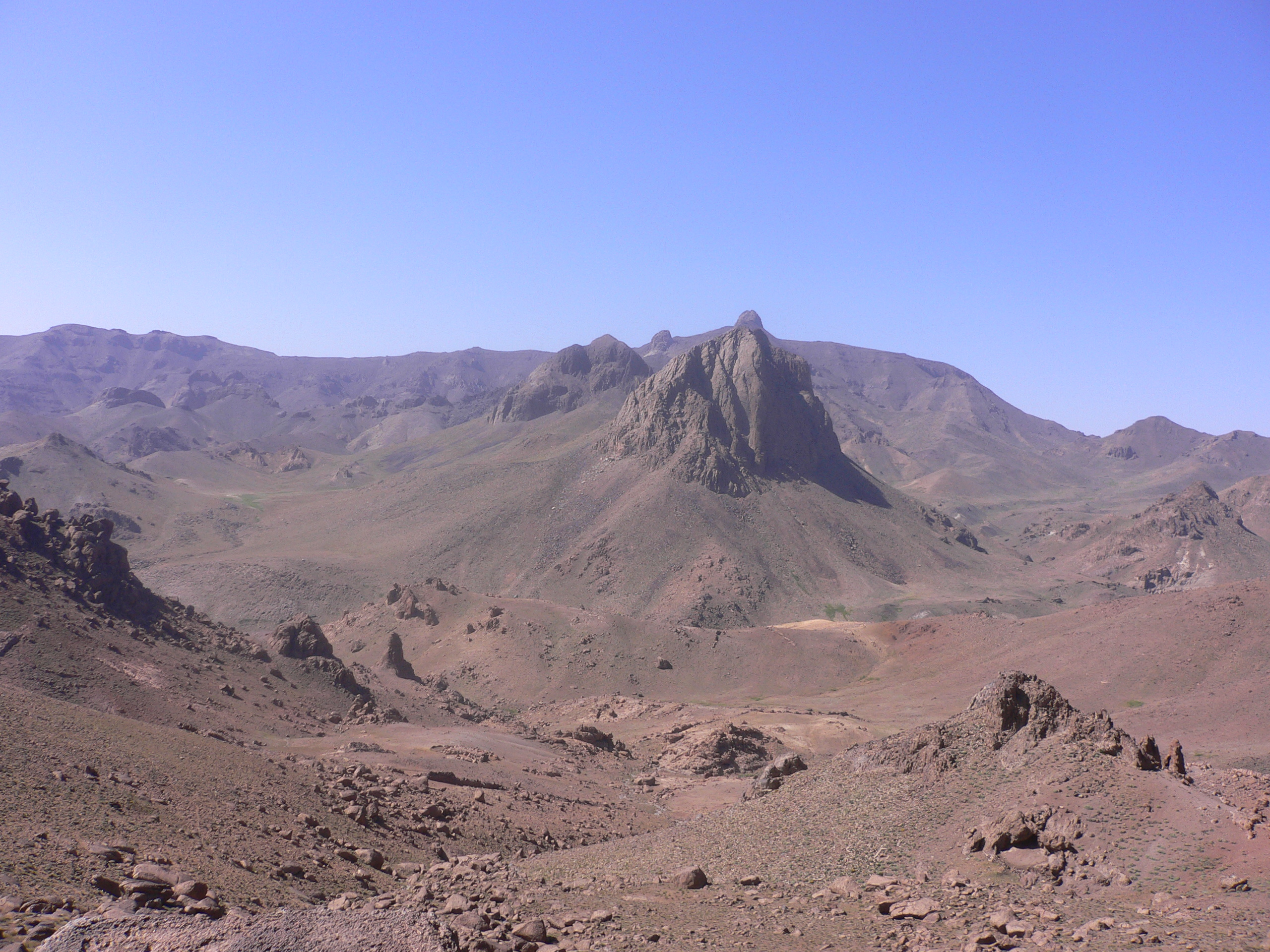 massif du Siroua